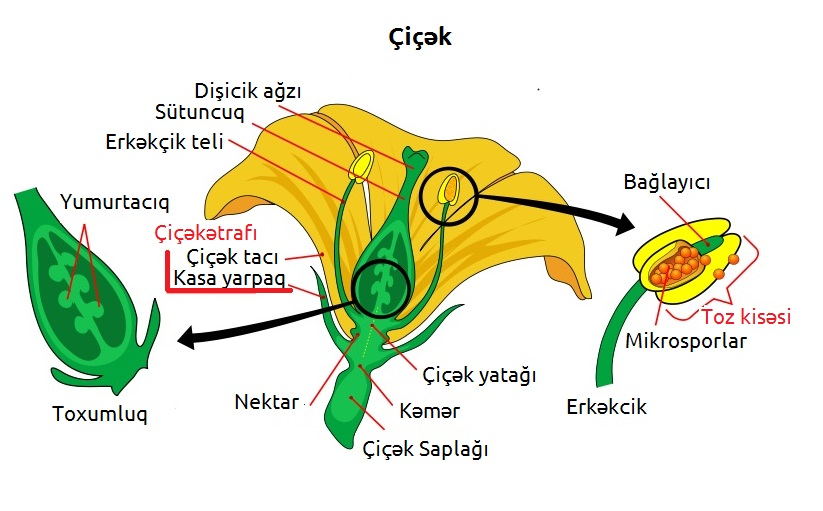 Çiçəyin hissələri